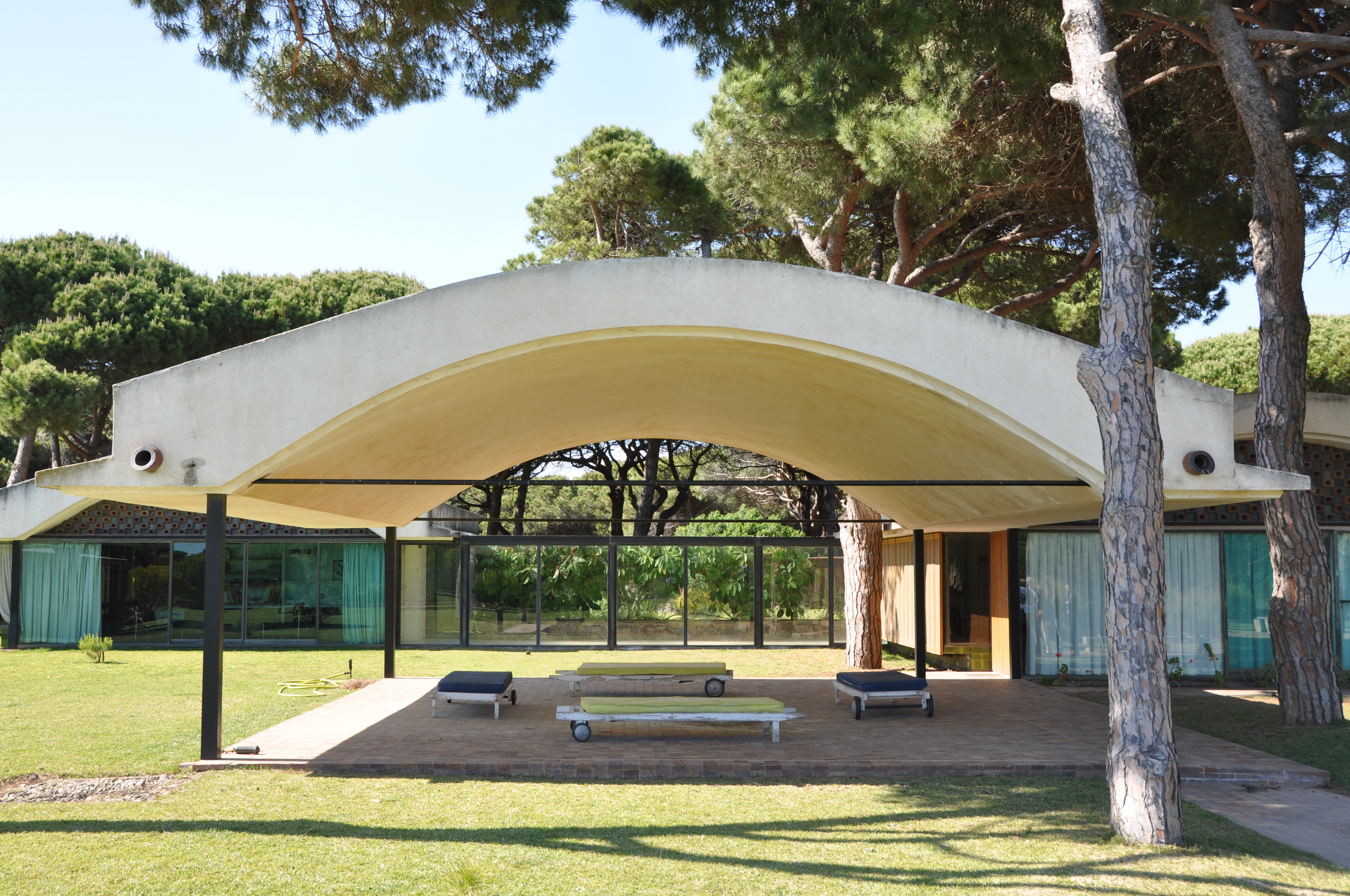 El Prat de Llobregat. La Ricarda (Gomis House). Antoni Bonet Castellana, architect (1949-1963)